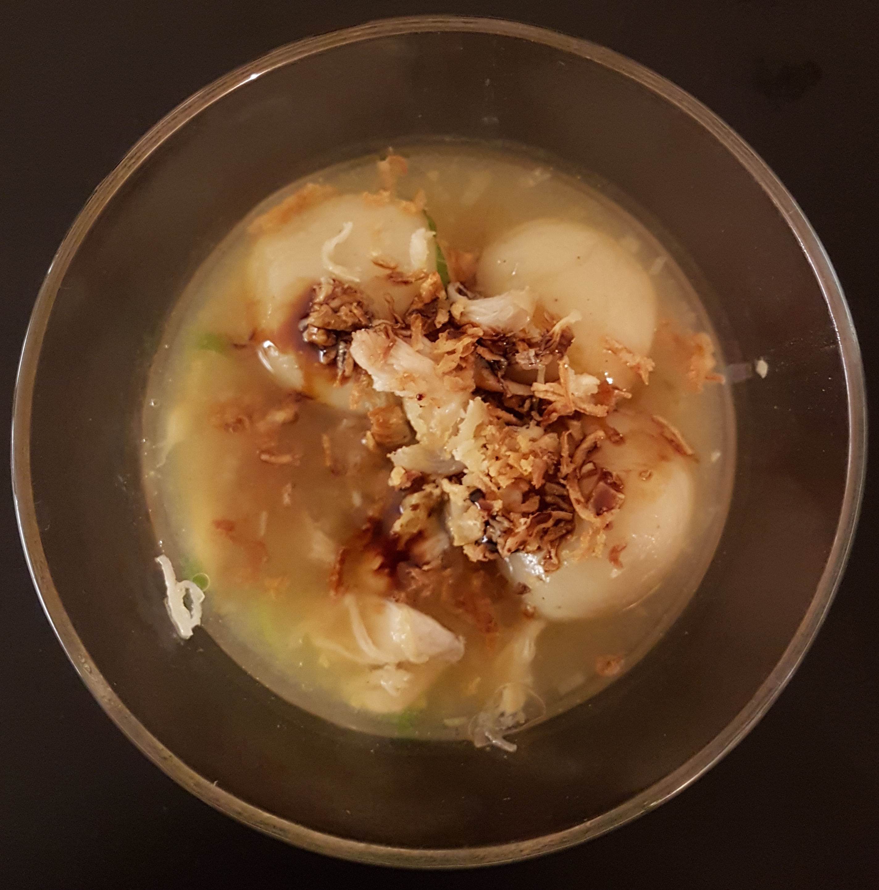 Cilok Kuah